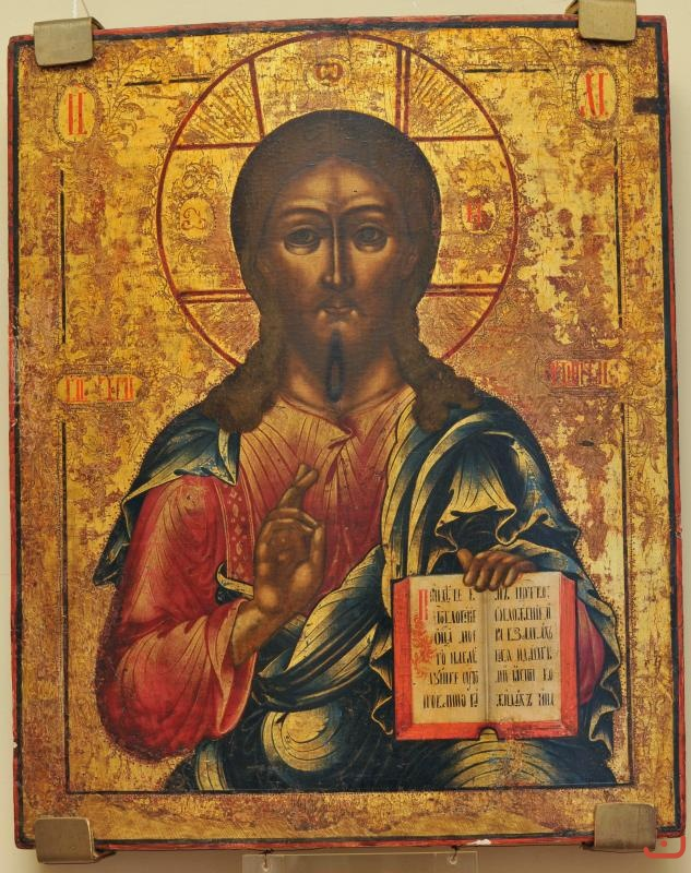 Деисус. XVIII в.